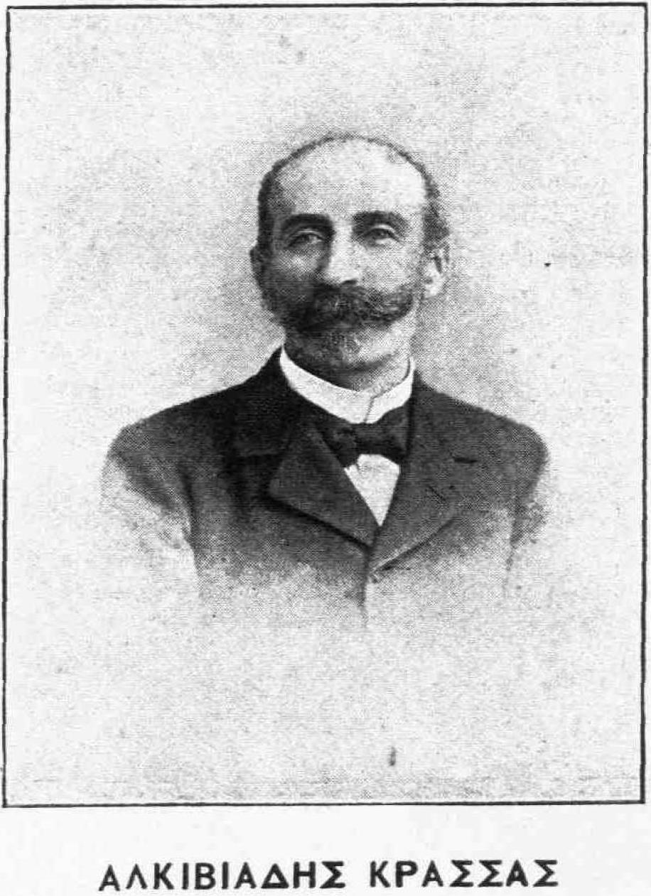 griechischer Universitätsprofessor und Schriftsteller, 19. Jahrhundert